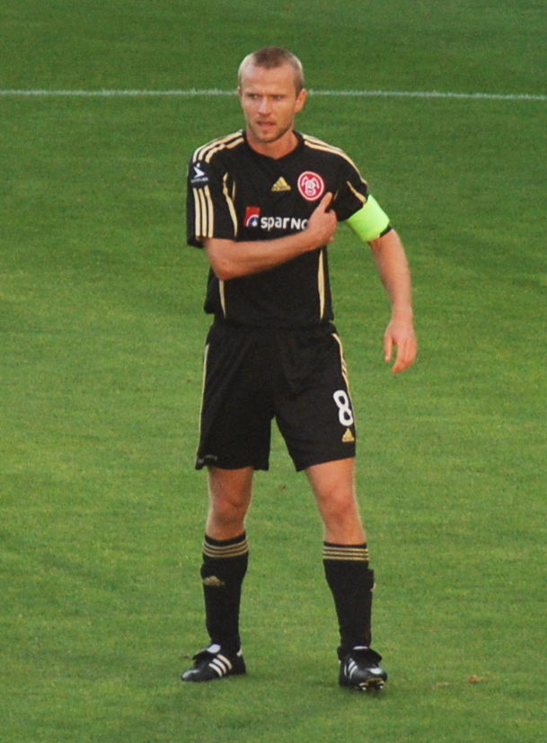 Fodboldspilleren Rasmus Würtz fra AaB. Her i pokalkampen imellem Viborg FF og AaB på Viborg Stadion.